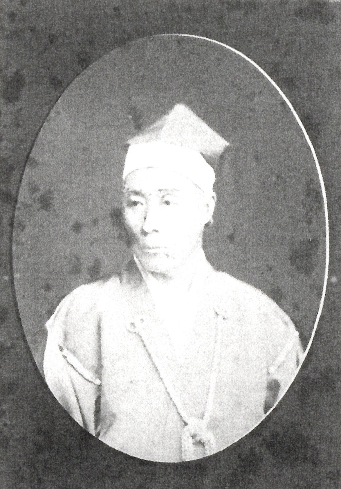 本多忠紀の肖像写真。